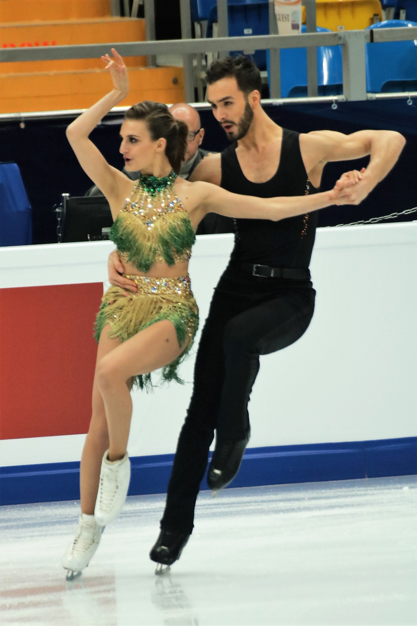 Габриэлла Пападакис / Гийом Сизерон (Франция) на Чемпионате Европы по фигурному катанию 2018.